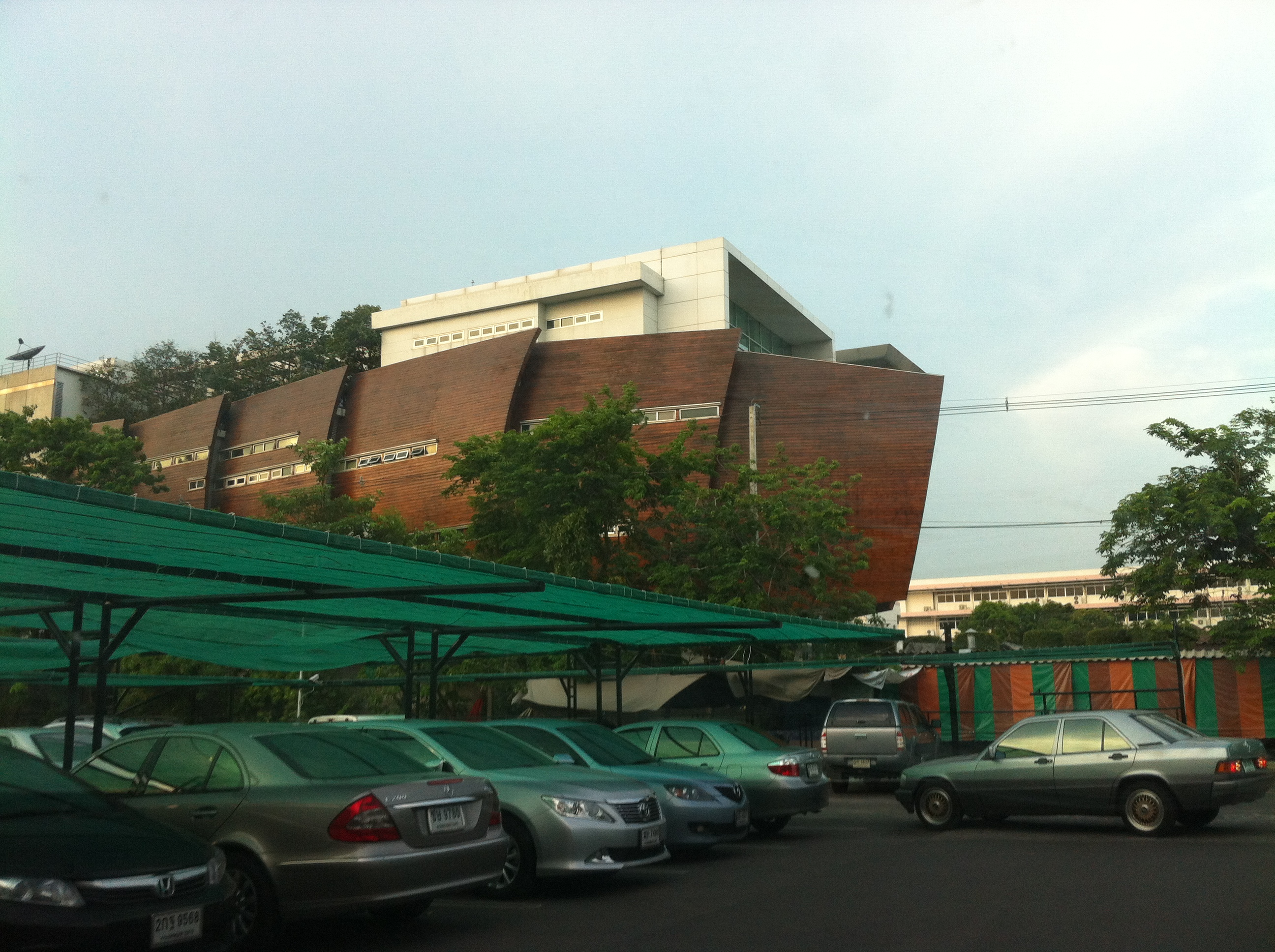 Saphan Sung, Bangkok 10240, Thailand